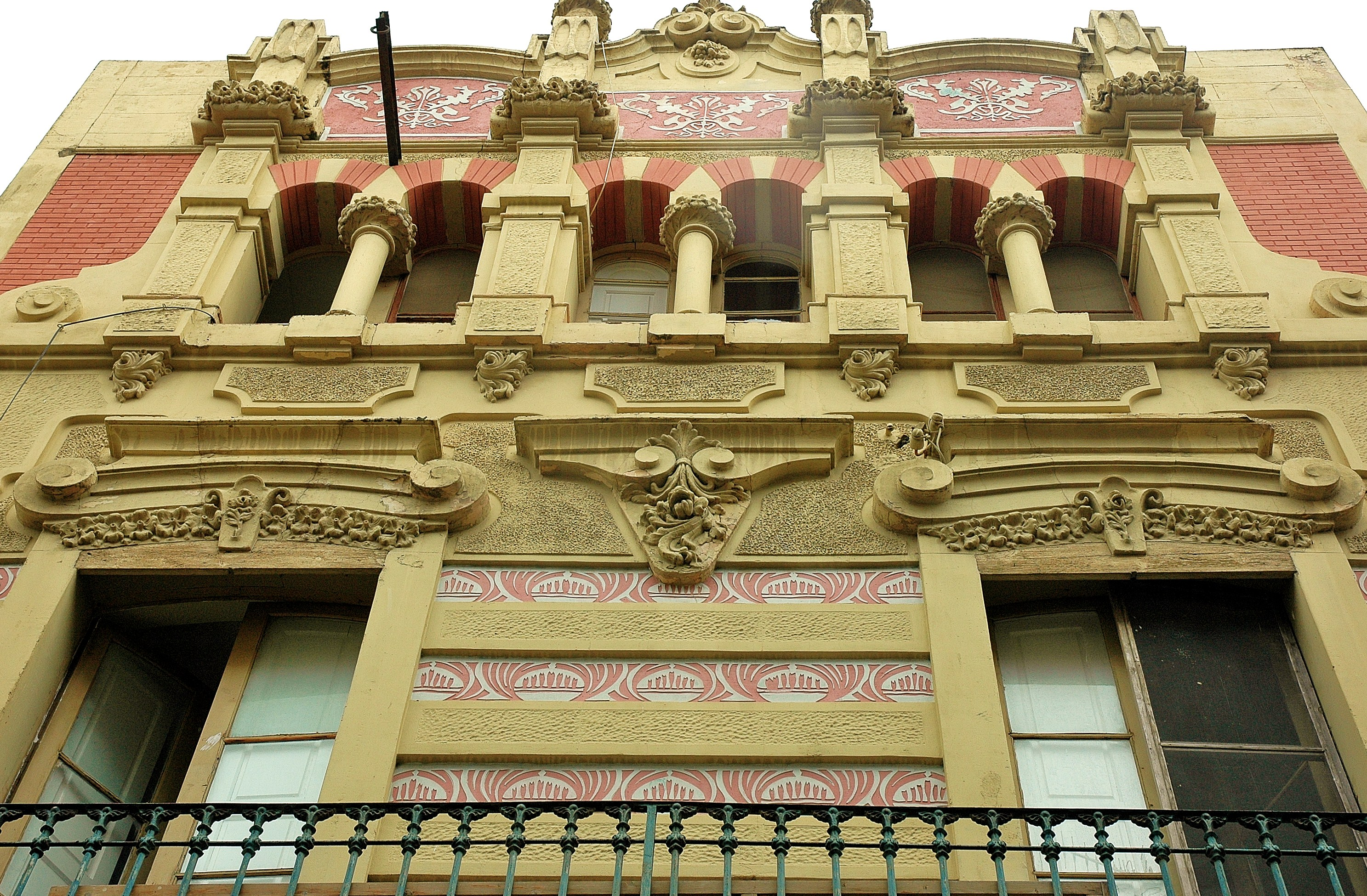 Amposta. Casa del Notari